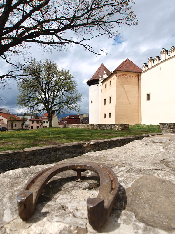 Kežmarok - Kežmarský hrad a podkova pre šťastie